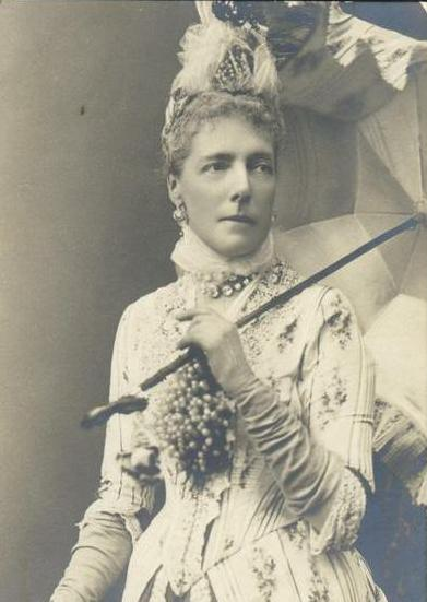 Marie Henriette von Österreich, zweite Königin der Belgier